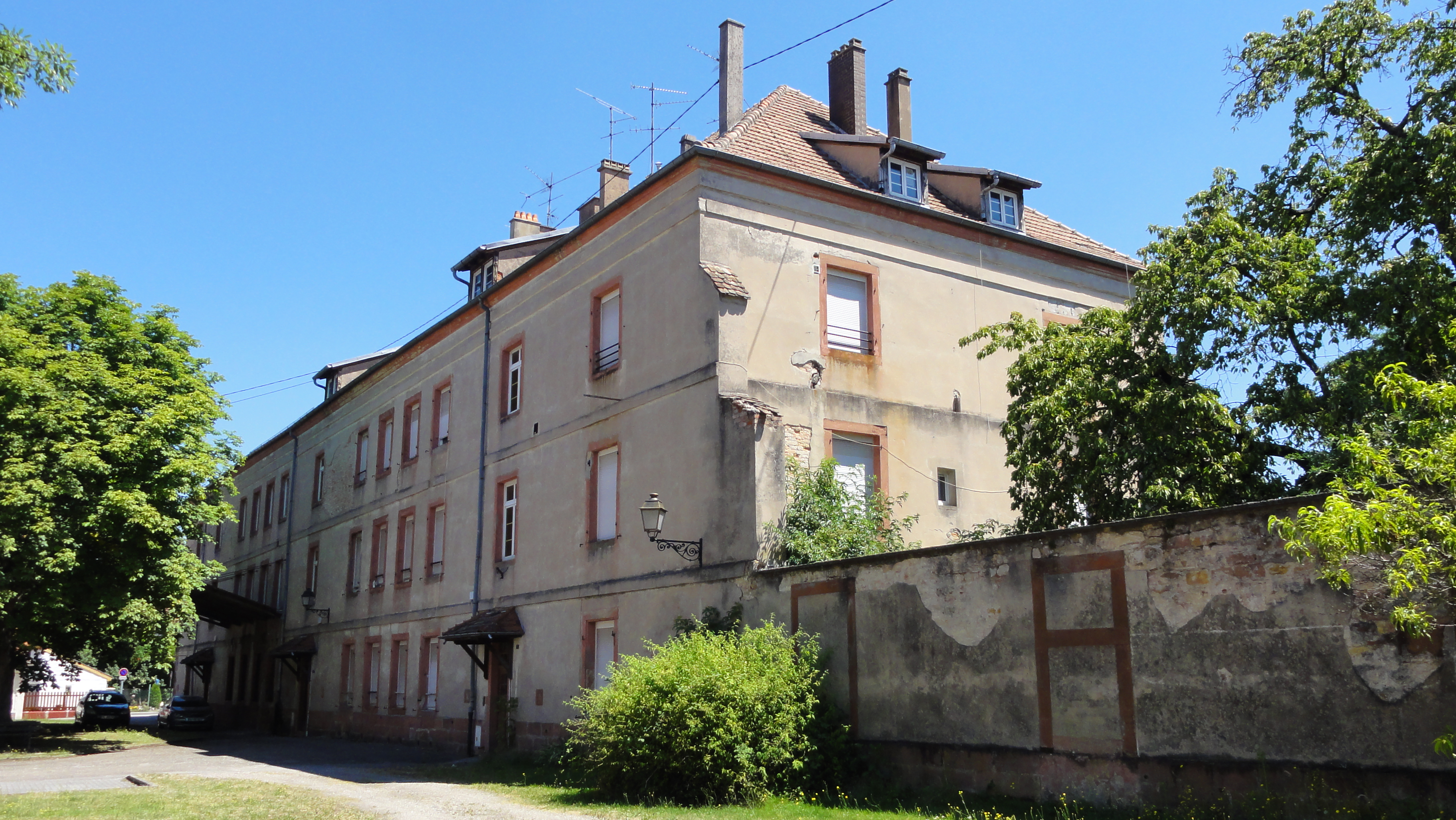 Alsace, Bas-Rhin, Lauterbourg, Caserne royale (1739), 5 rue de la Caserne. .